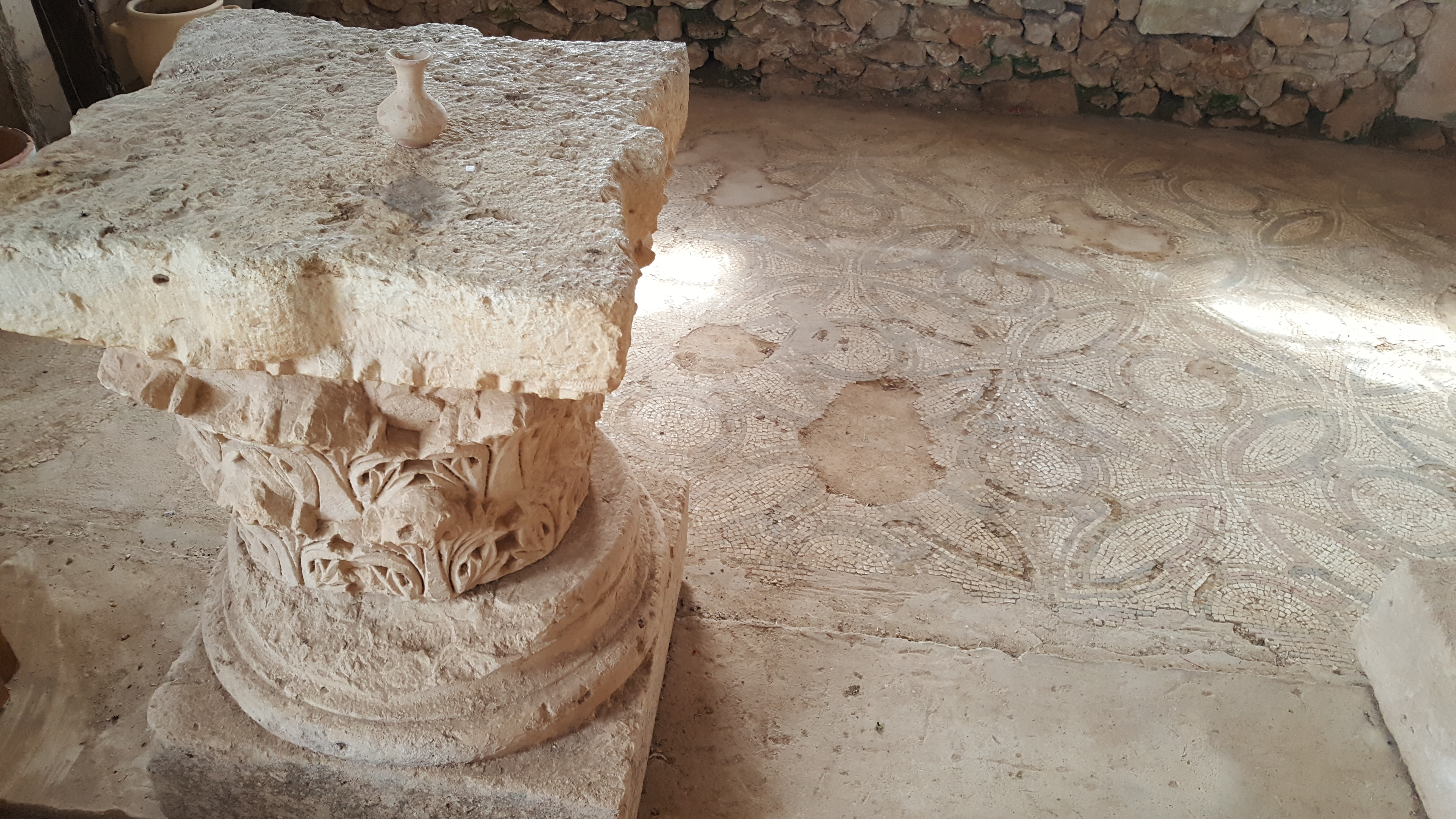 שילה העתיקה